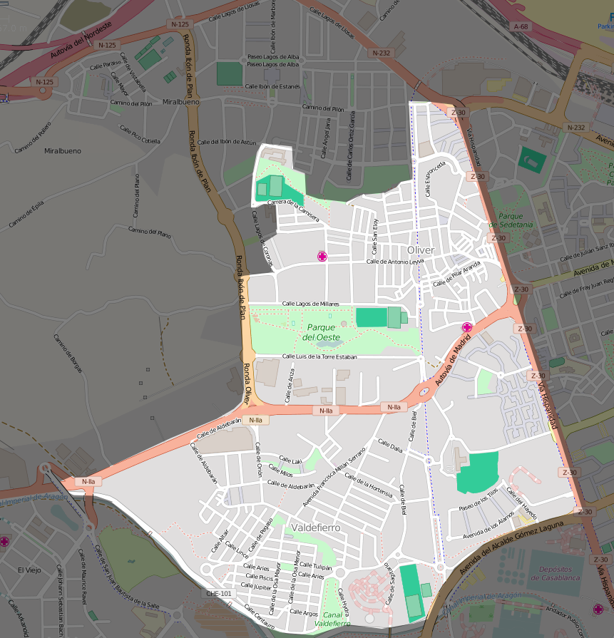 Mapa del distrito Oliver-Valdefierro en Zaragoza.